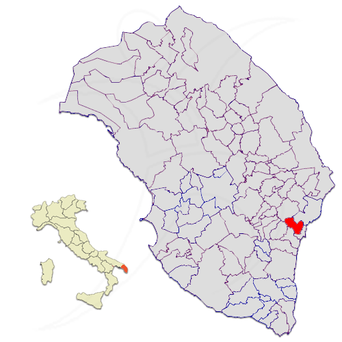 Il territorio del comune di Ortelle nella provincia di Lecce